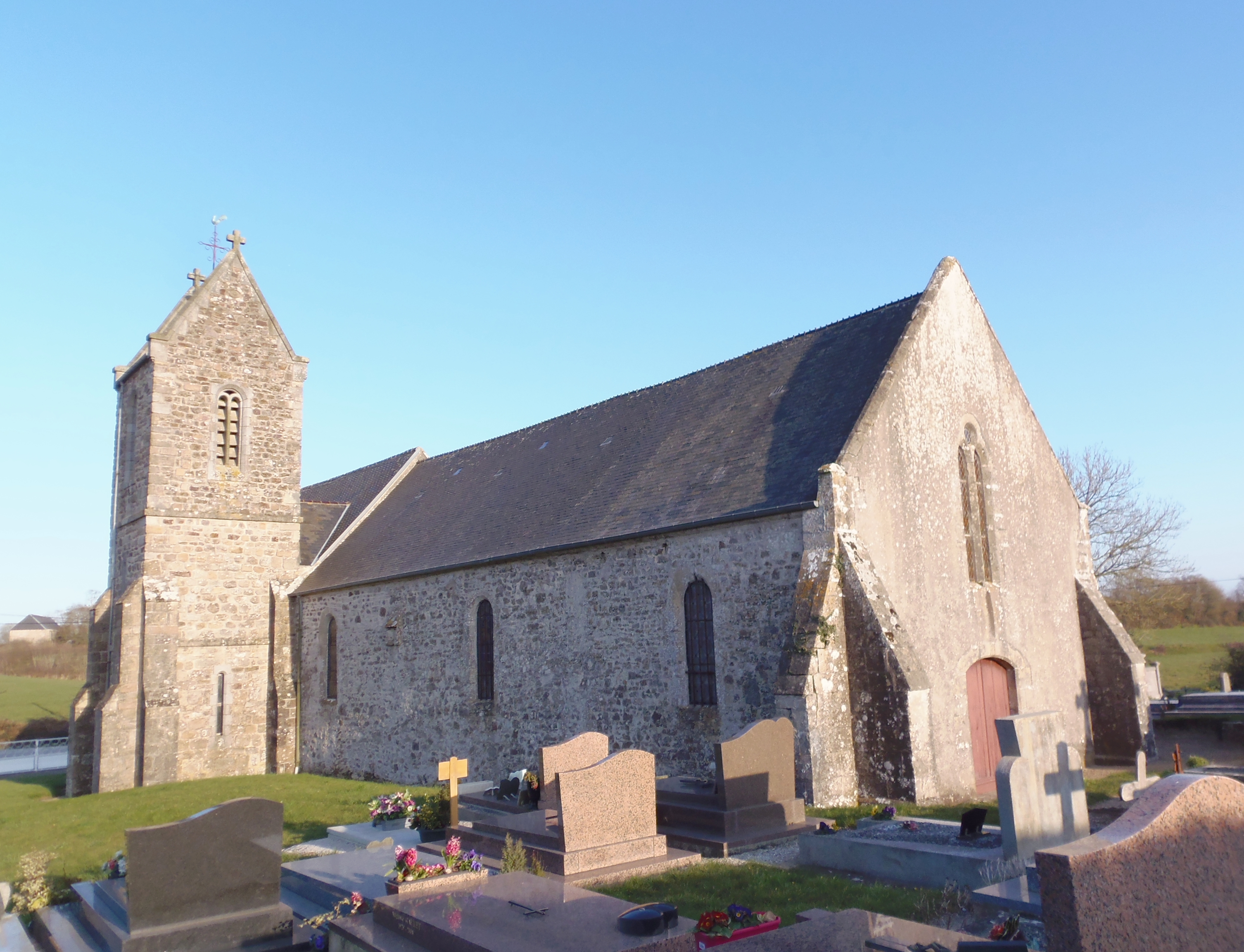 Crasville (Normandie, France). L'église Sainte-Colombe.